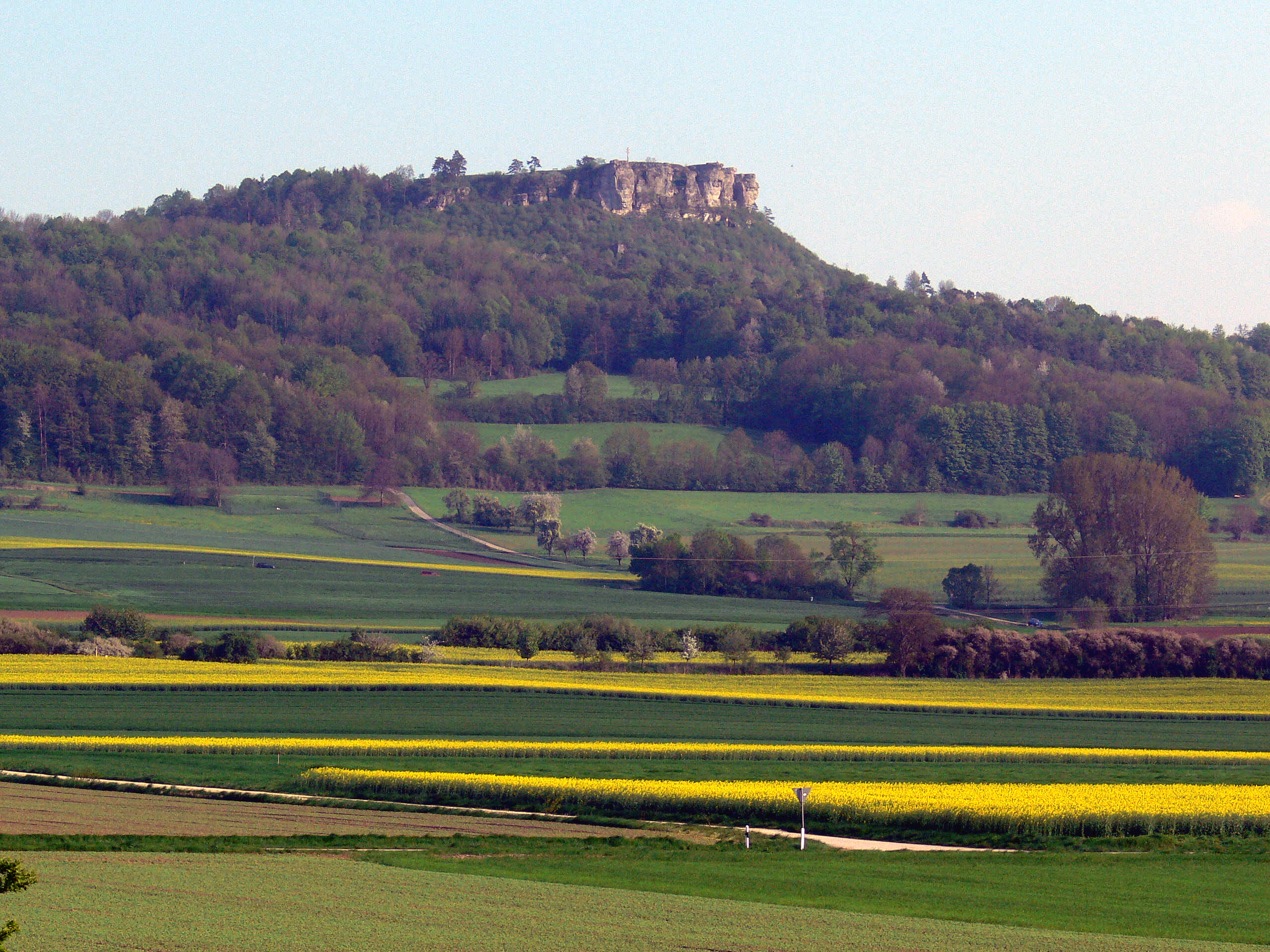 Der Staffelberg bei Staffelstein in Oberfranken